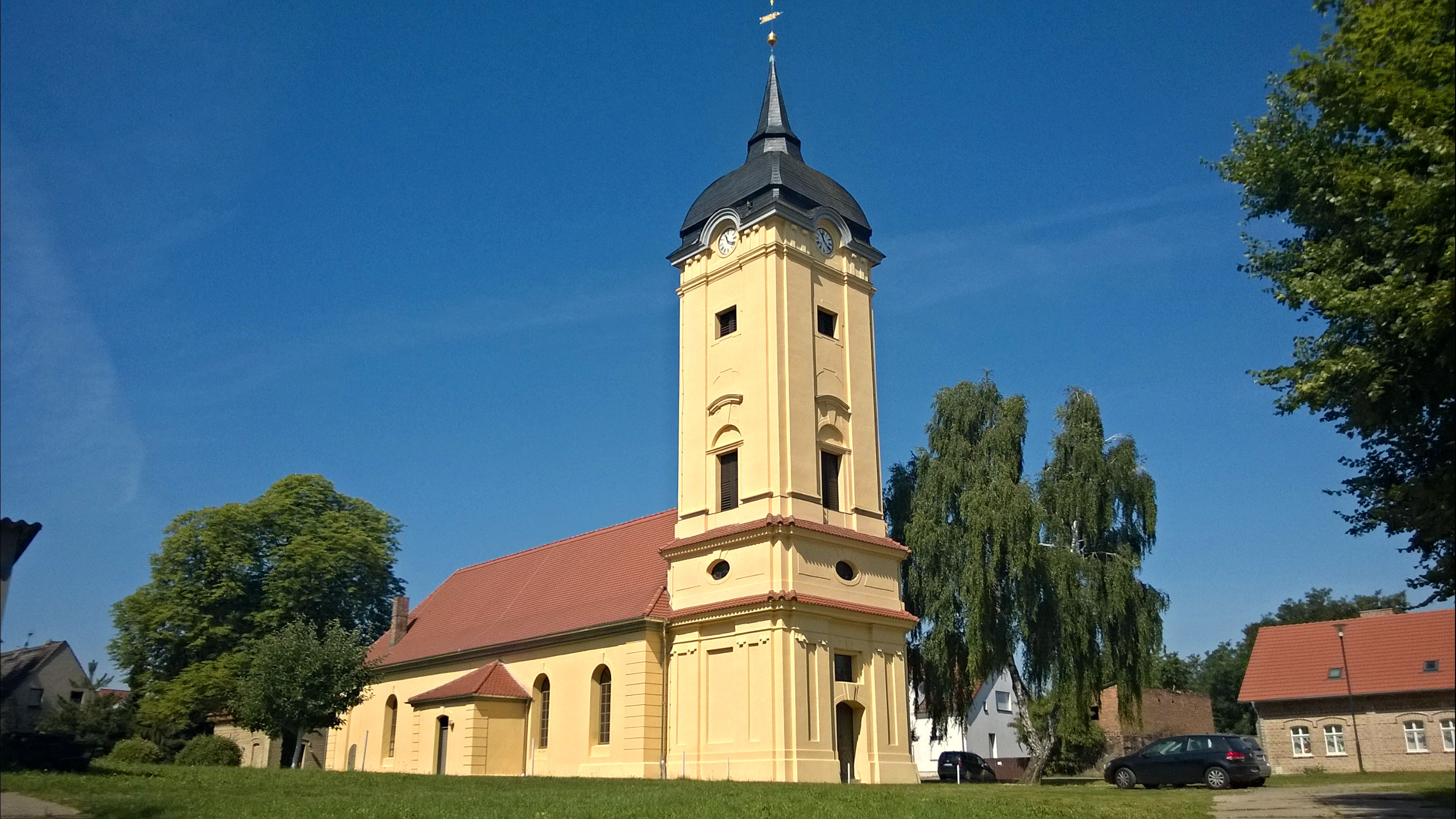 Church in Prötzel near Strausberg, Germany